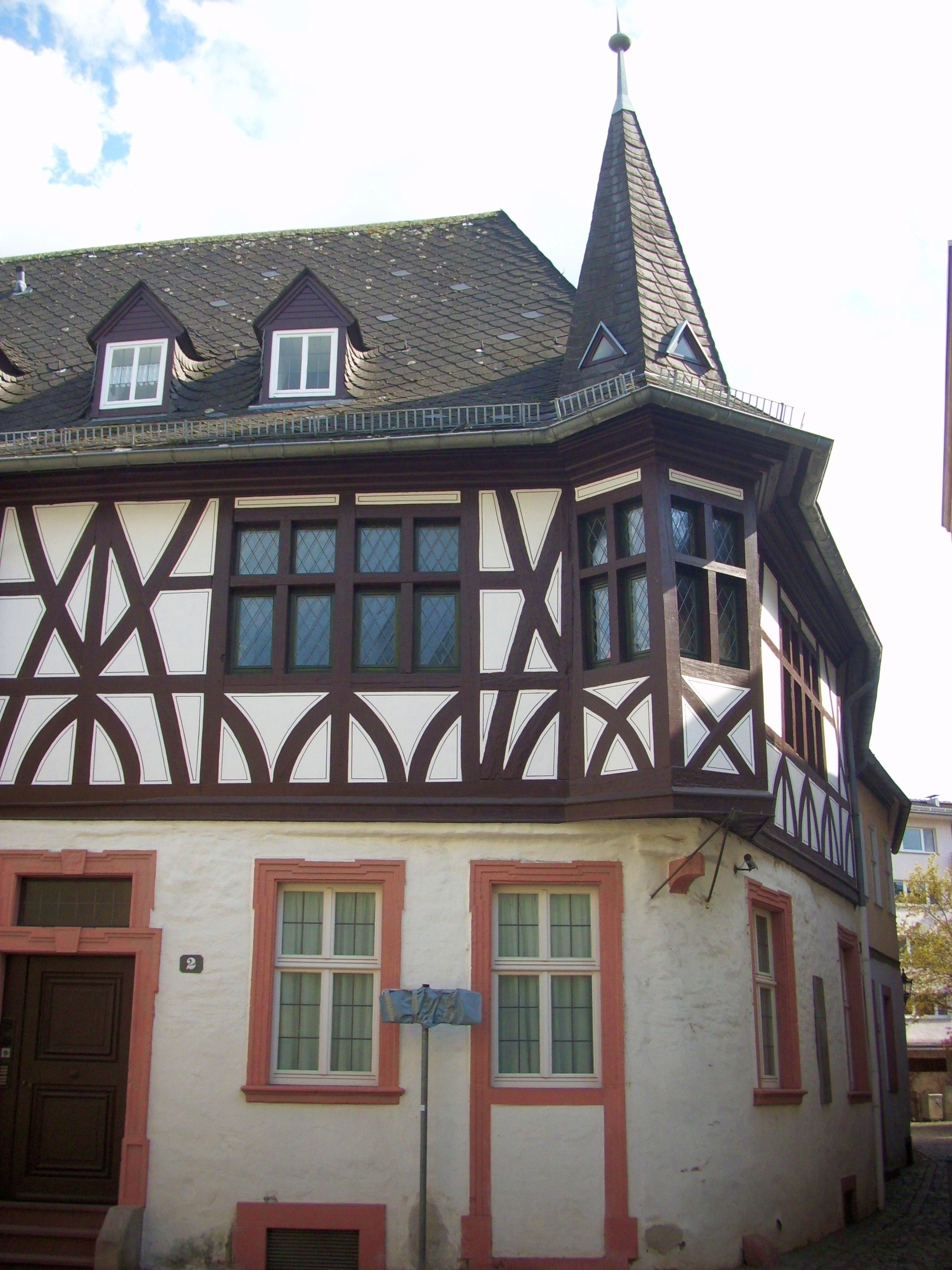 Langgestreckte Hofanlage, im massiven Erdgeschoss Architekturteile um 1500, Gewände 1730, Fachwerkobergeschoss mit spätgotischen Resten, Eckständer am anschließenden Putzbau